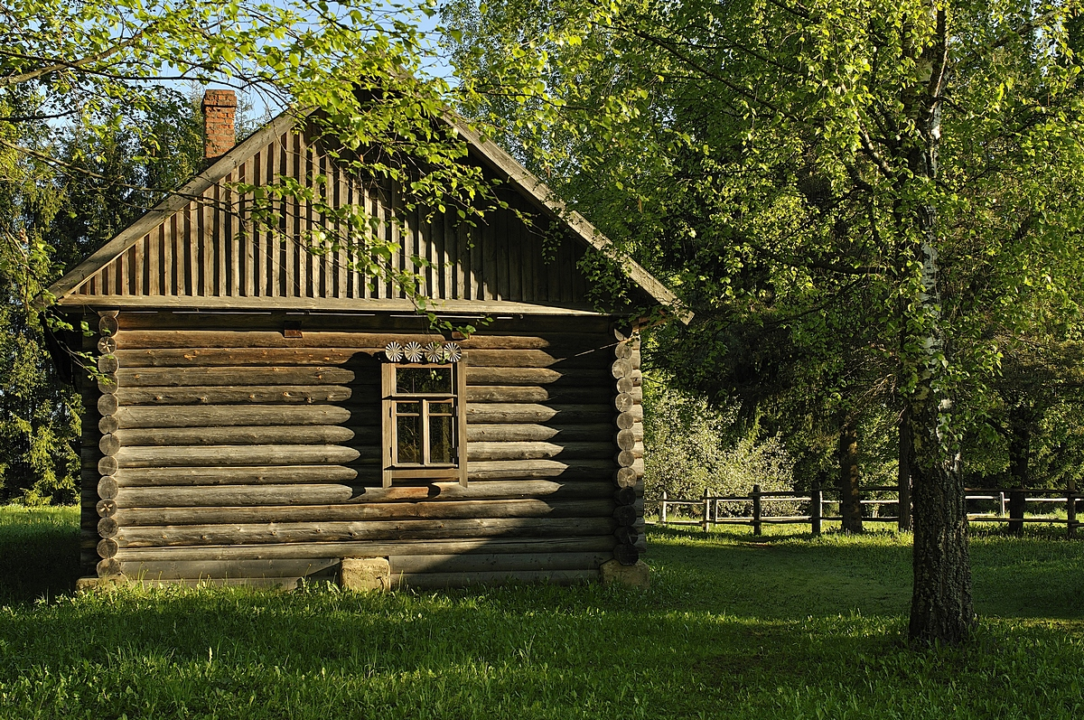 Хутор Загорье, восстановленный братьями поэта